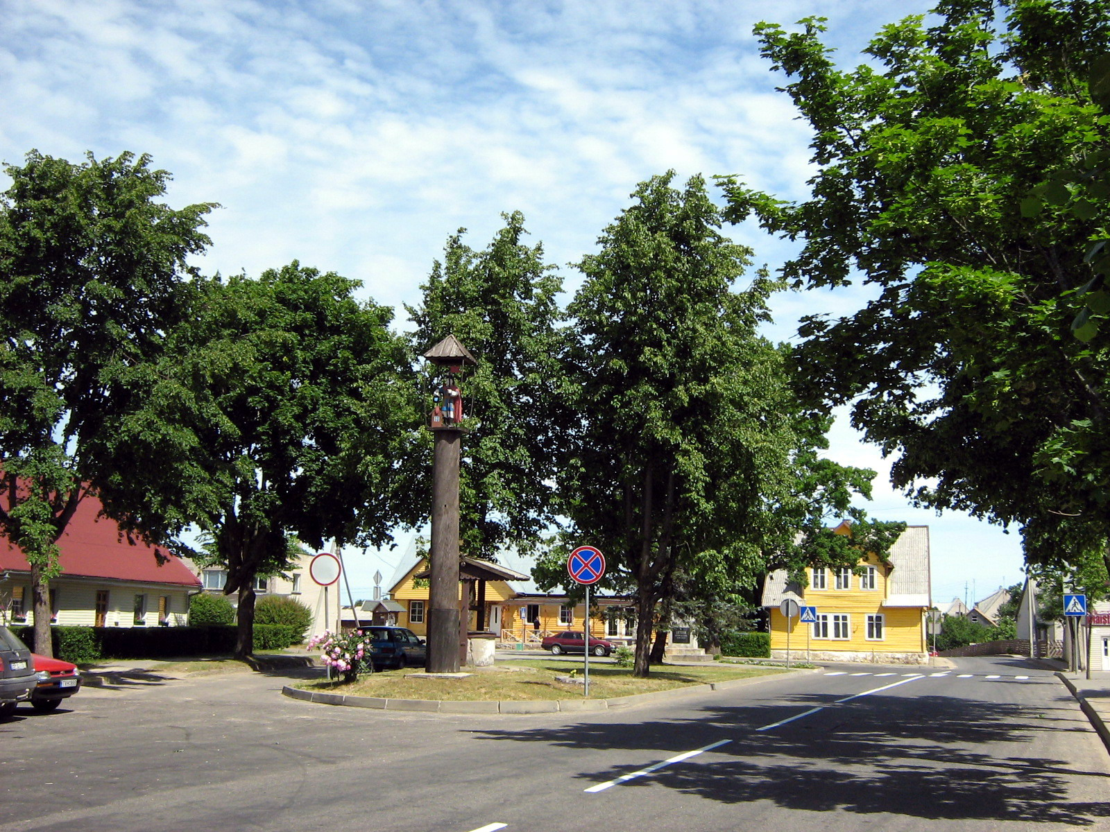 Plateliai Foto: Algirdas, 2007-06-15